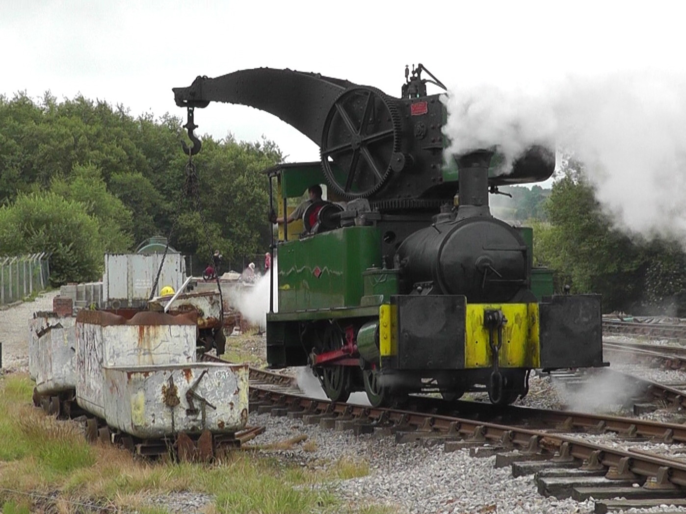 Dubs Crane Tank 4101 wird bei der Foxfield Steam Gala 2013 eingesetzt